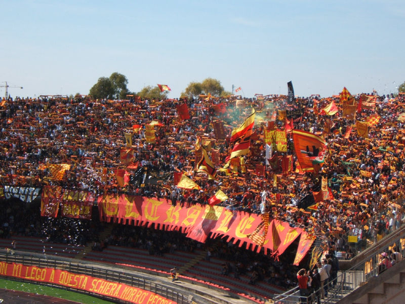 Lecce - Stadio Via del Mare, Curva Nord. Lecce-Lazio 5-3 (coordinates: 40°21'54"N 18°12'31"E)